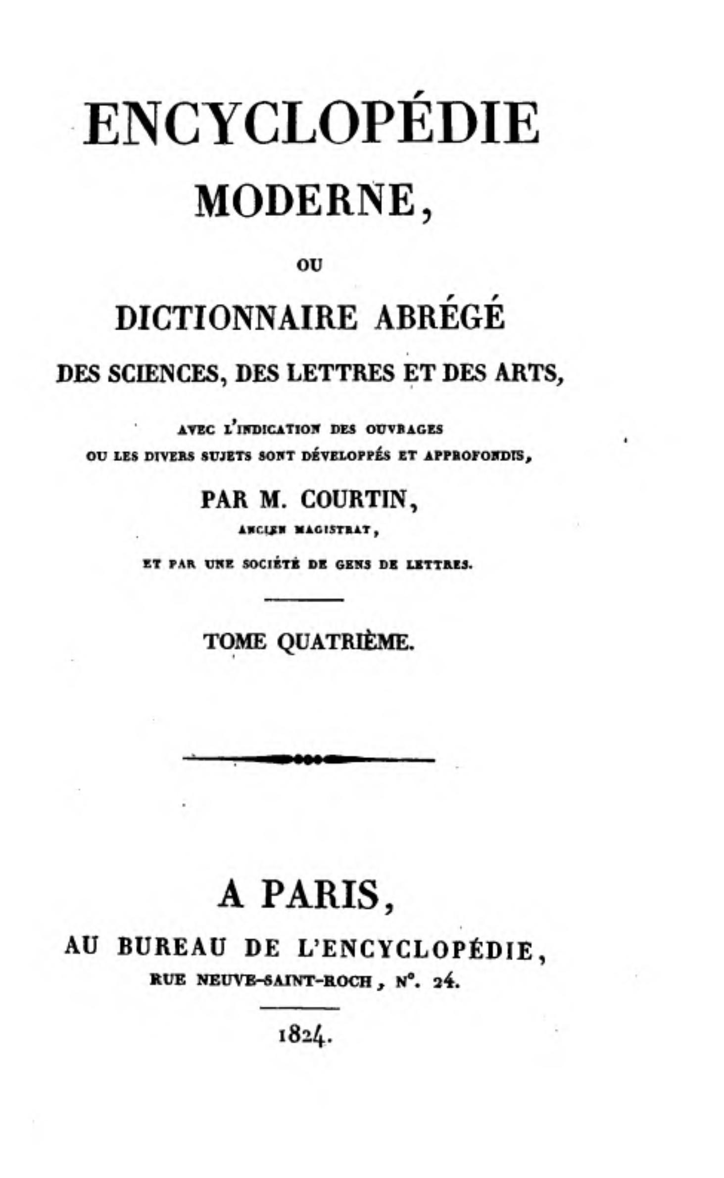 Couverture du tome 4 de l'Encyclopédie moderne de 1824